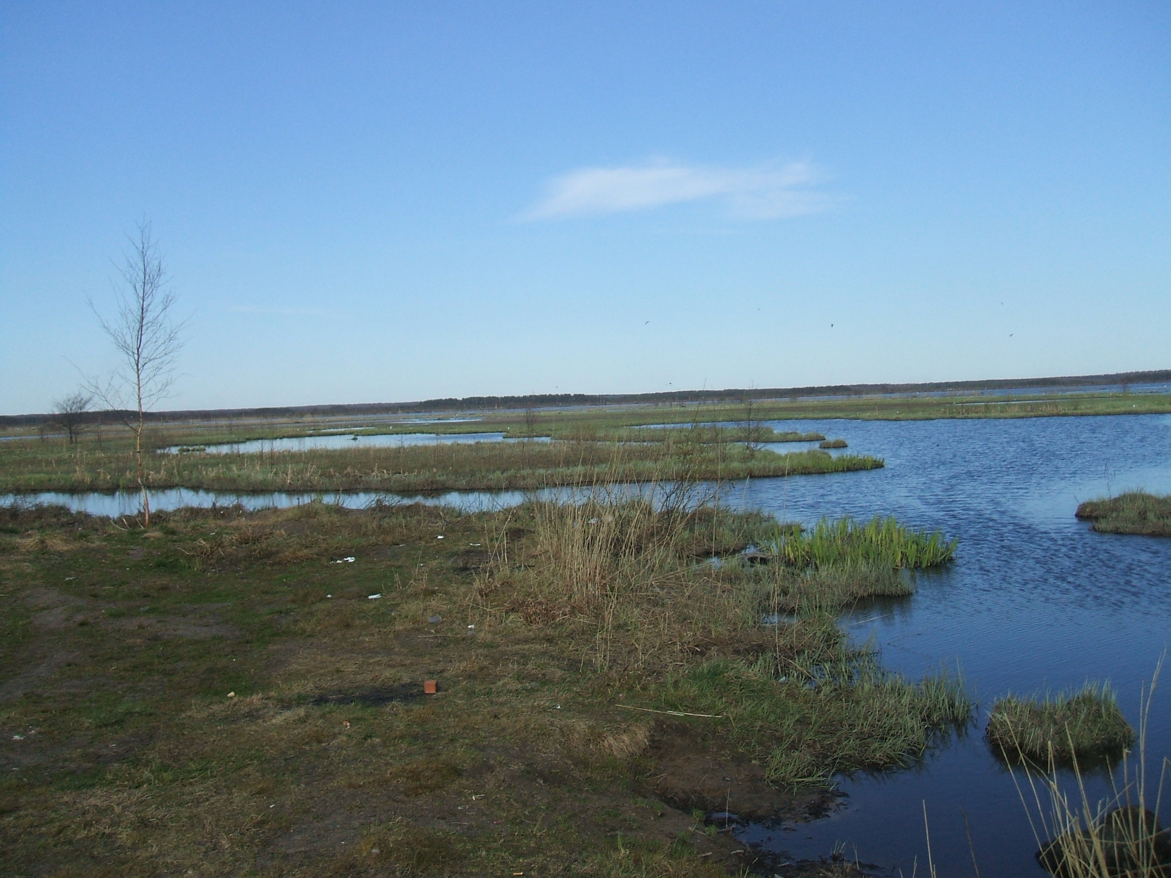 Сестрорецк СПб Река Сестра - устье реки при впадении в Сестрорецкий Разлив